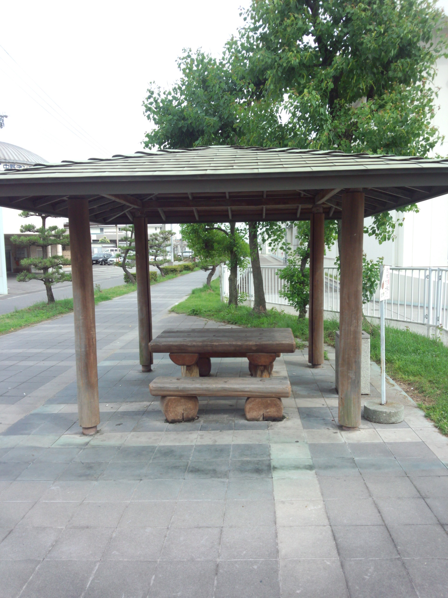 藤原製作所前駅